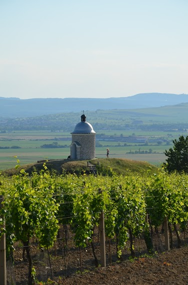 Velké Bílovice, kaple sv. Urbana, Václava, Cyrila a Metoděje